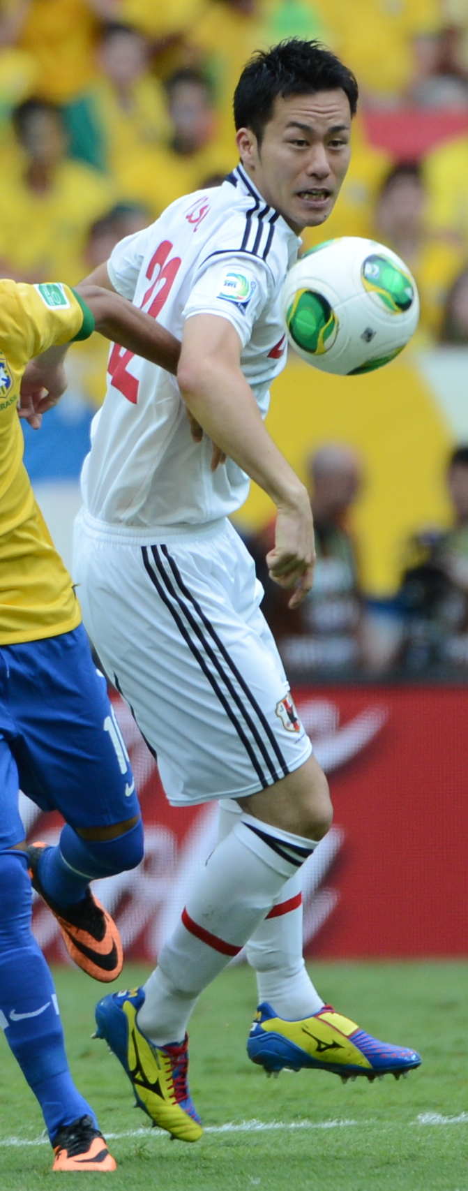 Jogo entre Brasil e Japão abre a Copa das Confederações